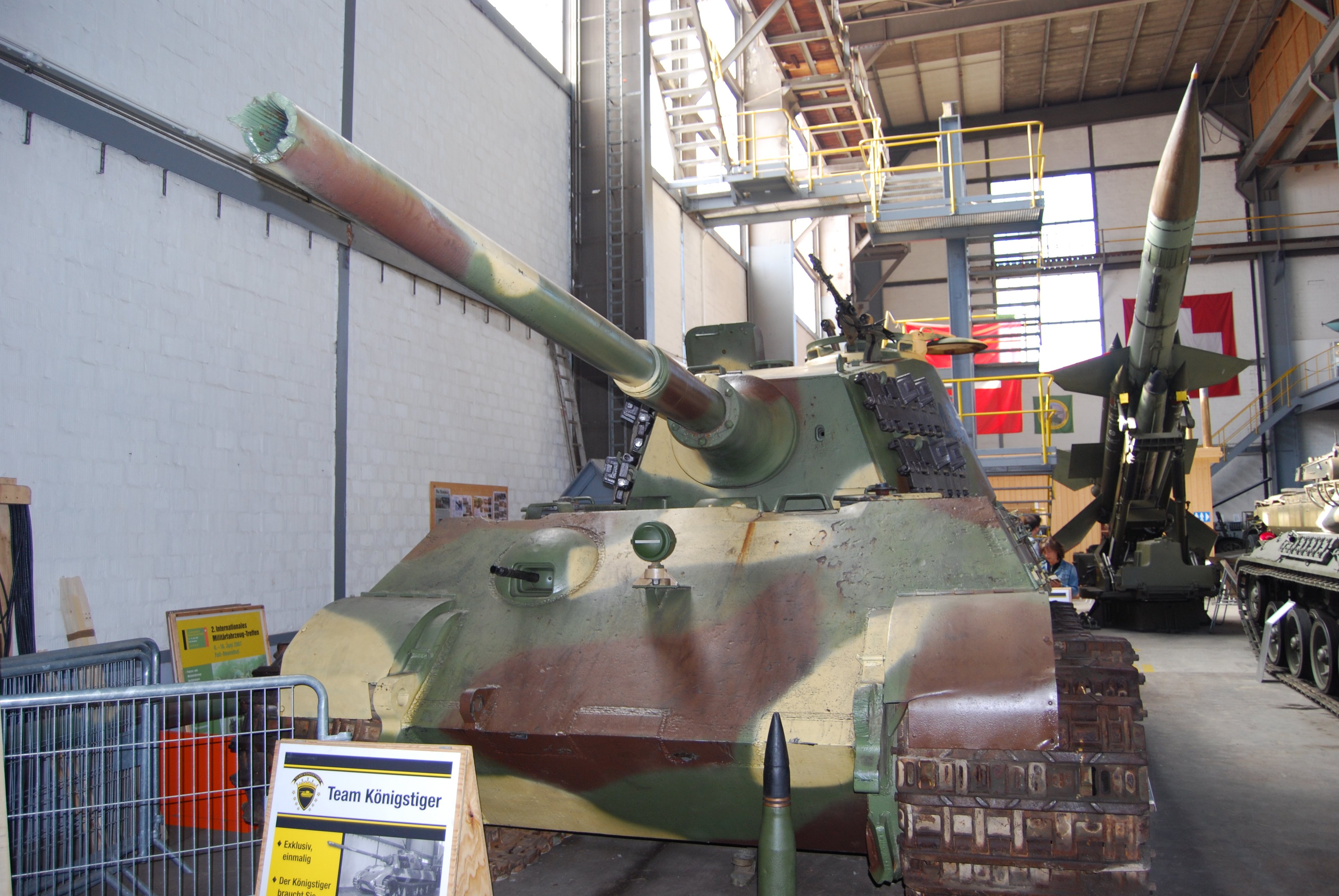 Königstiger mit Henschel-Turm im Schweizerischen Militärmuseum Full. Im Hintergrund Boden-Luft-Lenkwaffe Bloodhound.